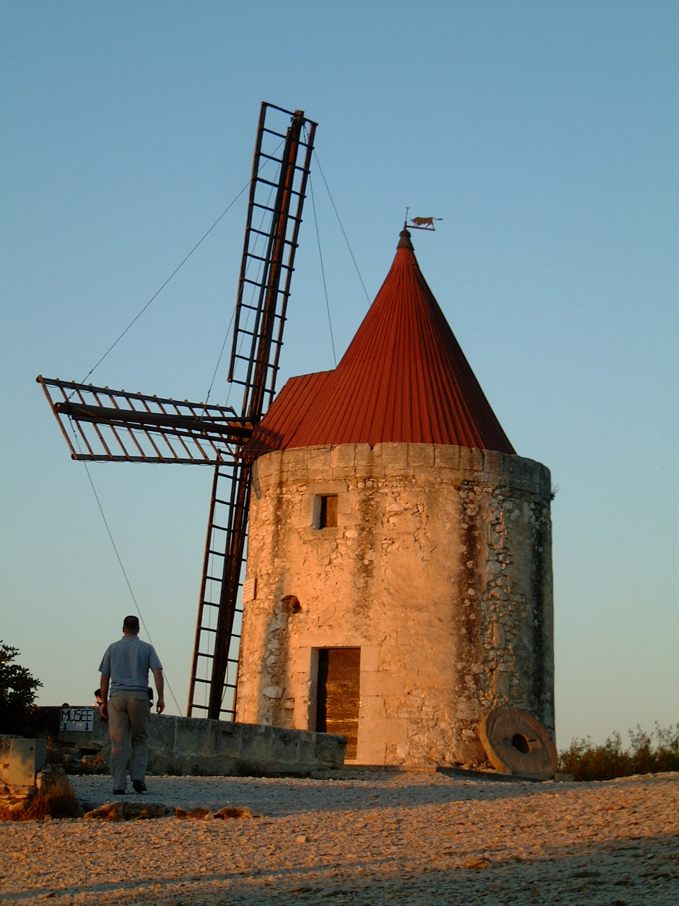 Moulin d'Alphonse Daudet